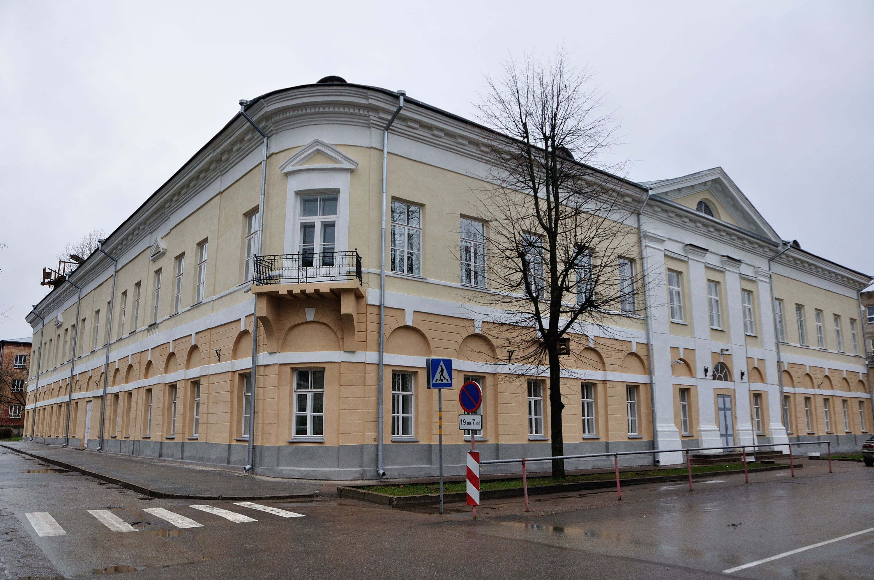 Здание бывшей нарвской мужской гимназии. В настоящее время Нарвская Ваналиннаская государственная школа (Narva Vanalinna Riigikool)